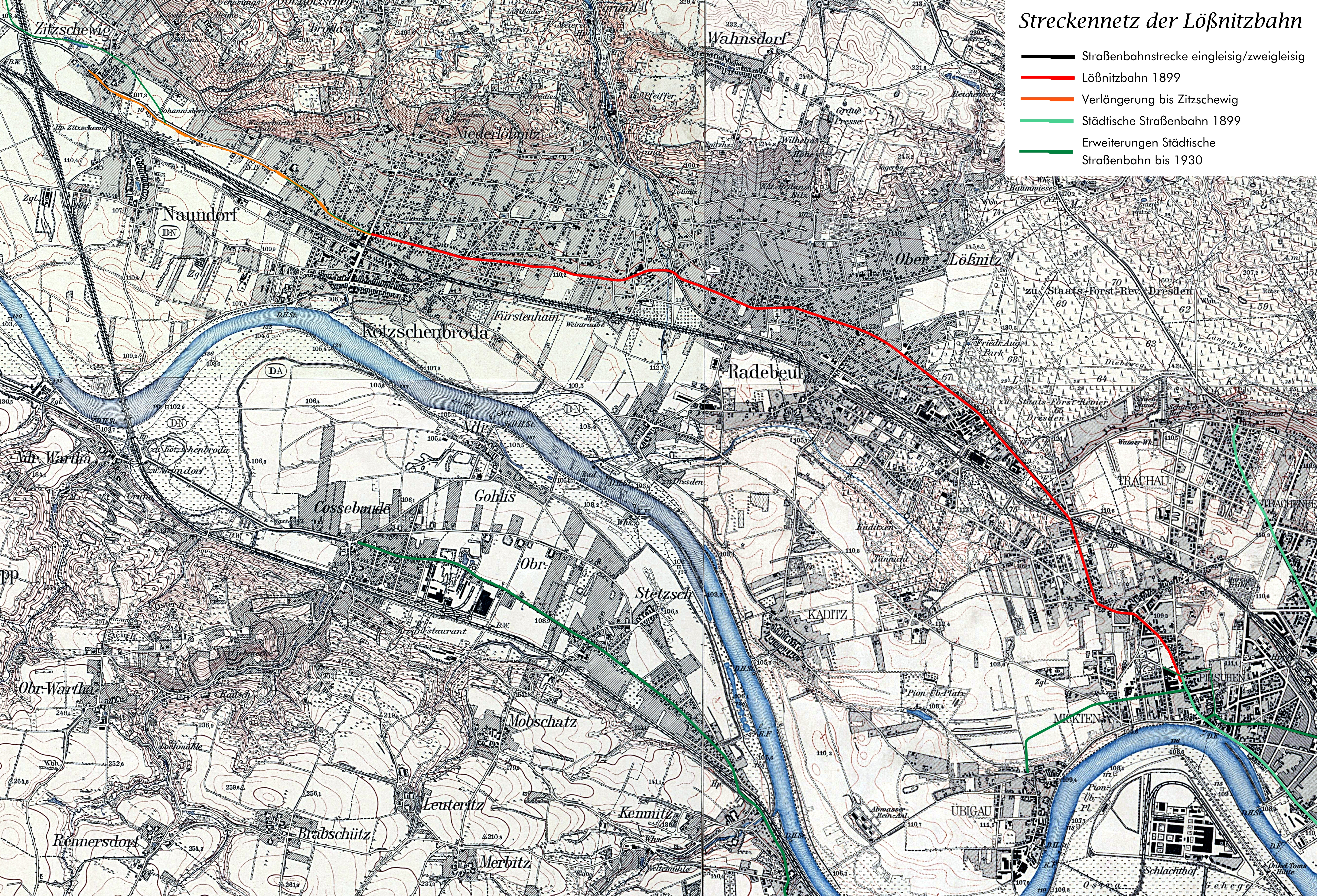 Streckennetzplan der Lößnitzbahn. Quelle ist im wesentlichen Mario Schatz: Meterspurige Straßenbahnen in Dresden, Verlag Kenning 2007, ISBN 3933613760